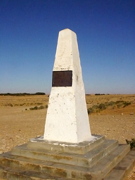 photographie personnelle prise en décembre 2004 représentant le monument du général Leclerc commémorant le passage de son armée en 1943 lors de la campagne de libération de la Tunisie des troupes allemandes de l'Afrika Korps.